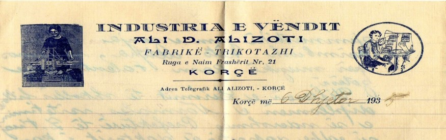 Licensa e fabrikes se Trikotazhit ne Korce